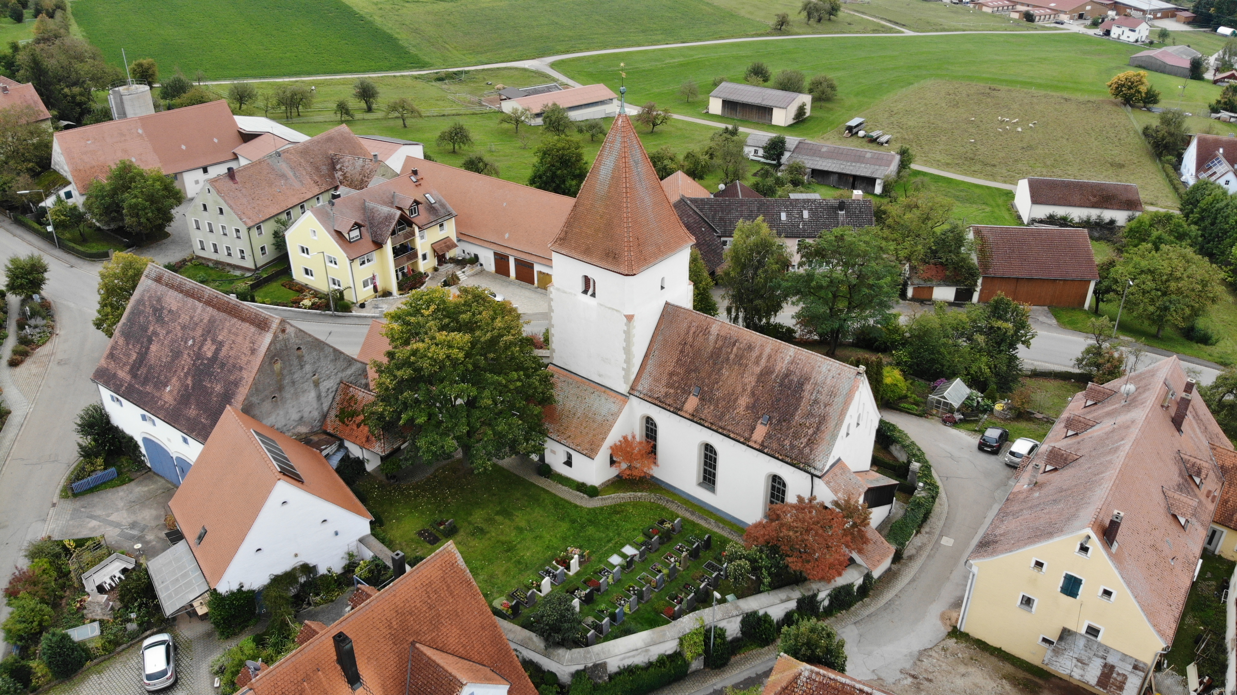 Luftbildaufnahme der Kirche St. Bartholomäus in Gundelsheim an der Altmühl. Fotografiert in Richtung Süden. Im Vordergrund der Friedhof mit der mittelalterlichen Friedhofsmauer.